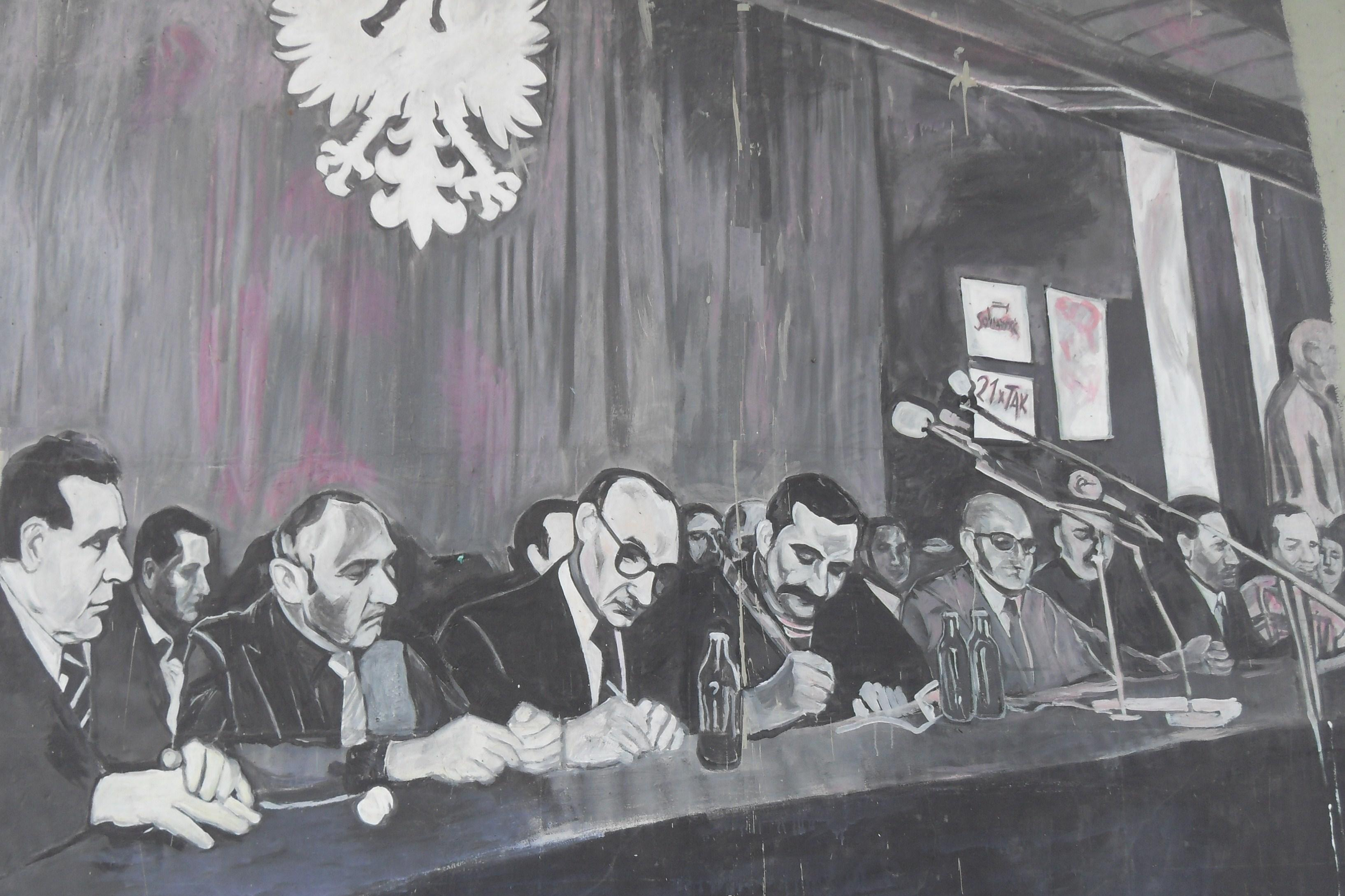 Podpisanie porozumień sierpniowych w Gdańsku, w sali BHP - mural w Gdańsku, na wiadukcie ul. Okopowej. Osoby w pierwszym rzędzie od lewej: 3-ci Mieczysław Jagielski, 4-ty Lech Wałęsa, 5-ty Tadeusz Fiszbach.